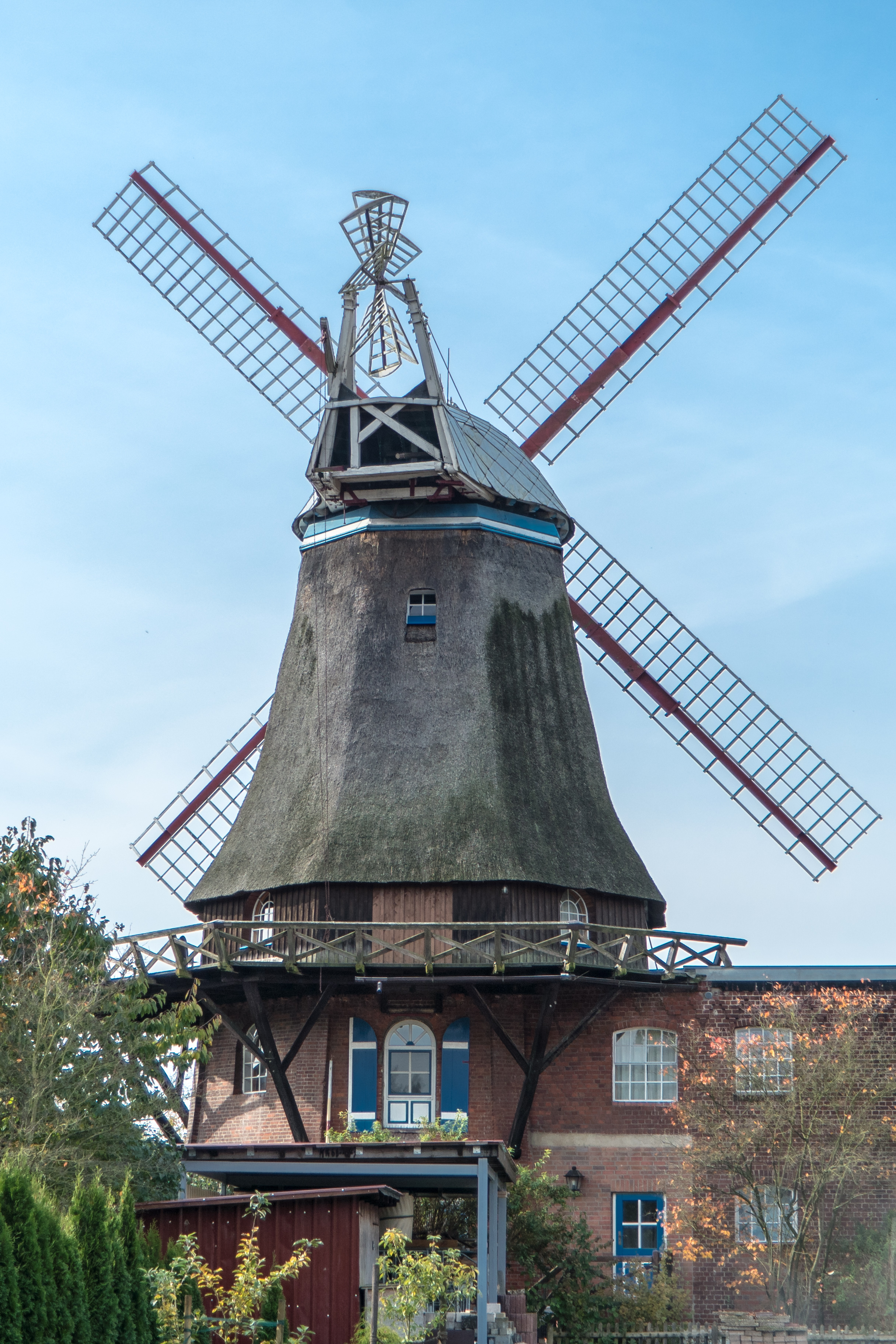 Galerieholländermühle Handorf